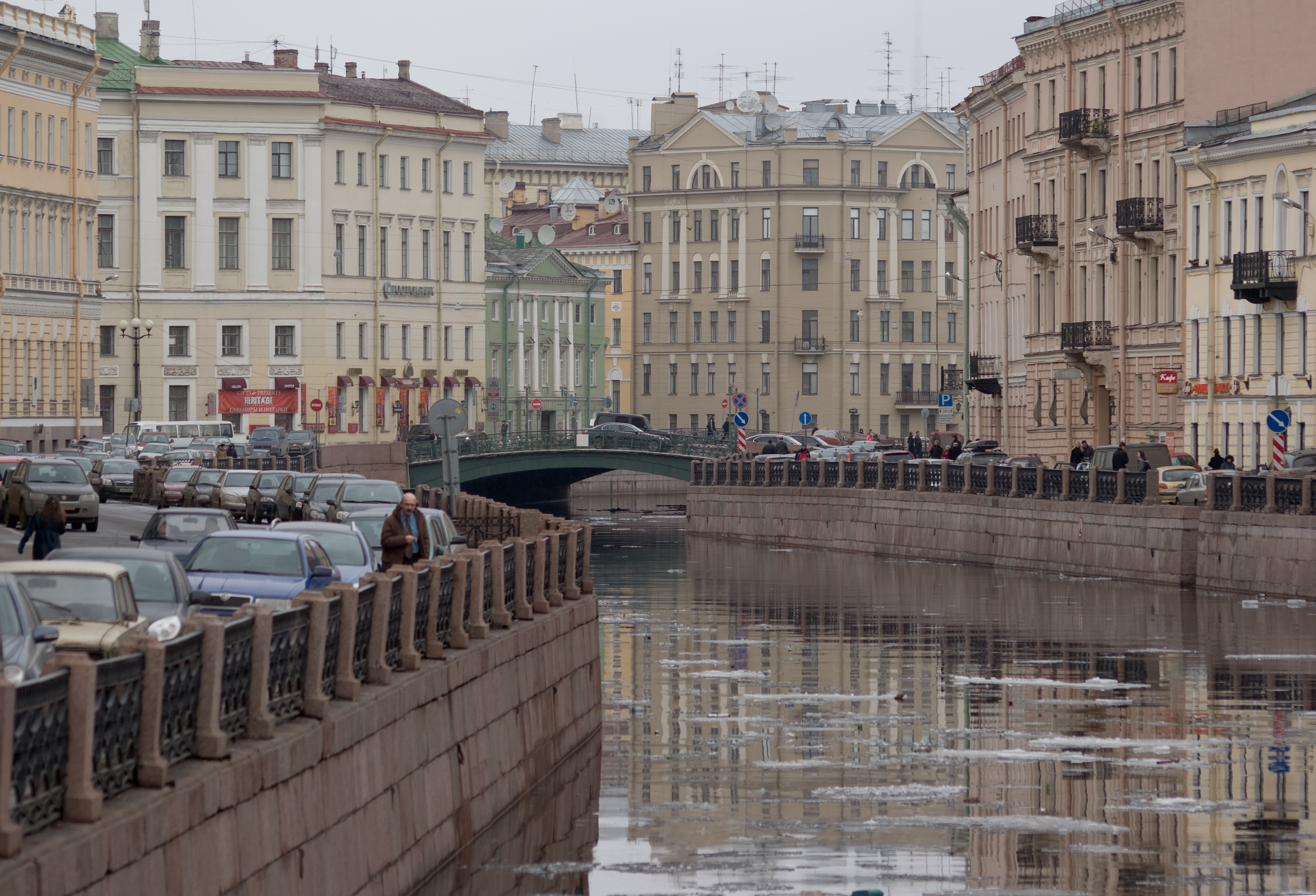 Певческий мост и набережная реки Мойки, вид с Зелёного моста. (Так же: Река Мойка, набережная реки Мойки). Санкт-Петербург.